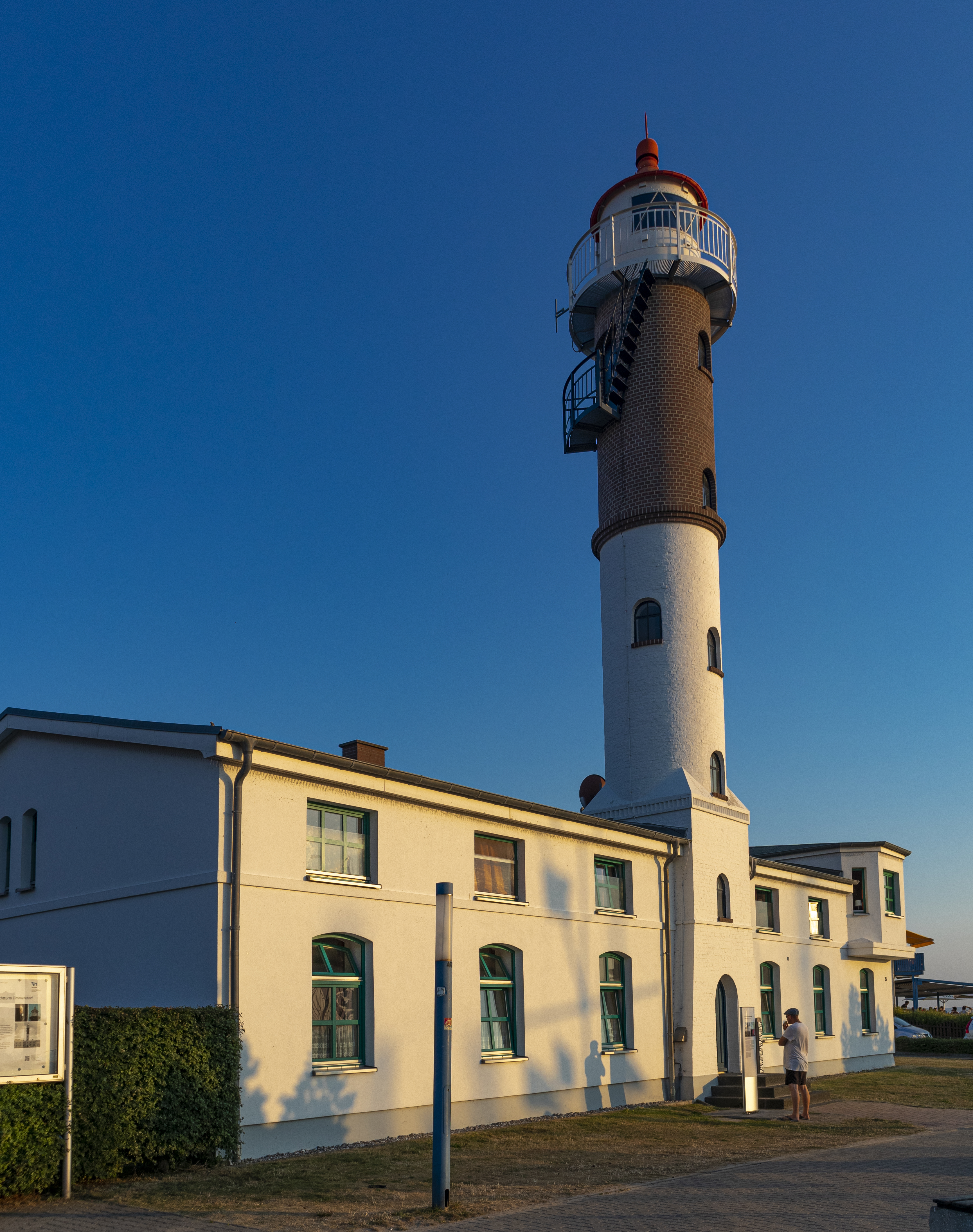 Insel Poel